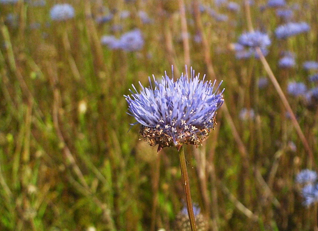 Jasione montana, Campanulaceae - Haber